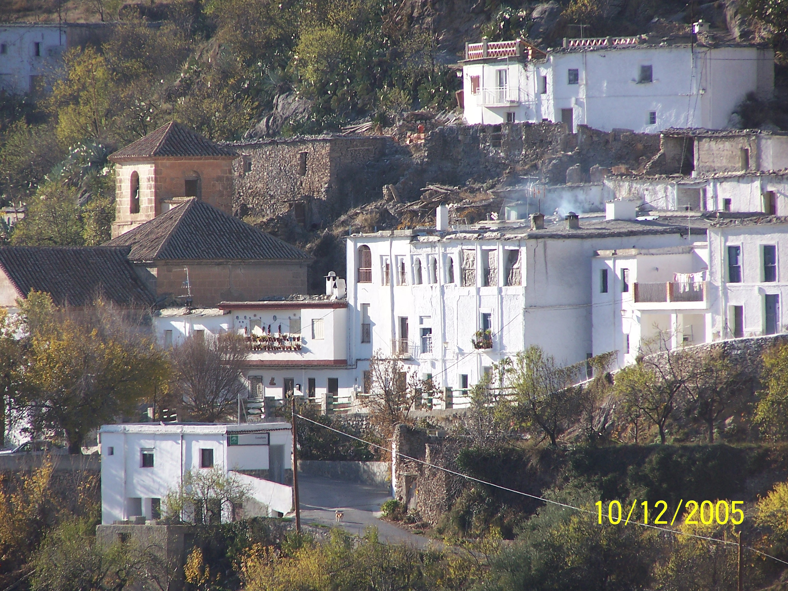 Tímar (Alpujarra)